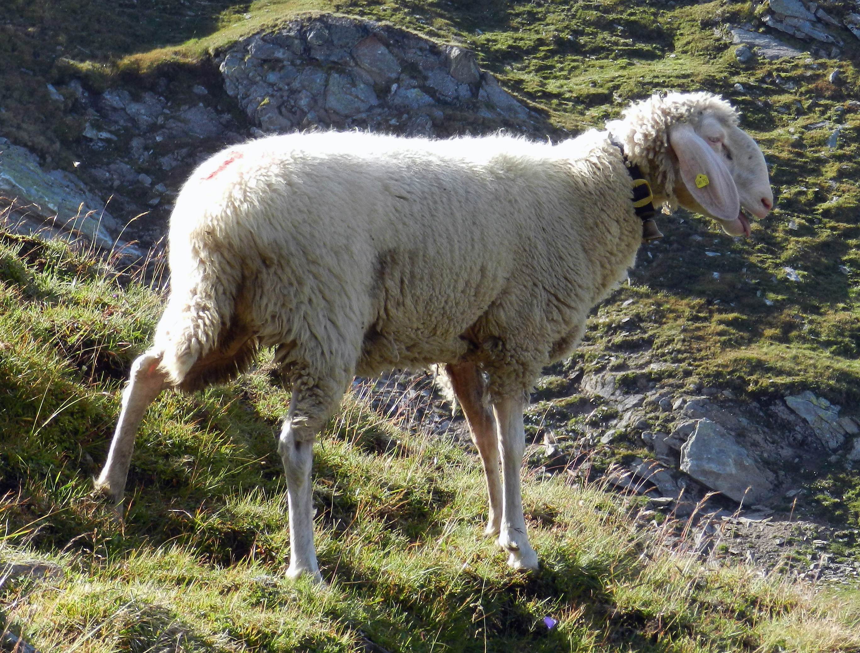 Tiroler Bergschaf. Aufgenommen oberhalb der Karl-von-Edel-Hütte an der Ahornspitze (Zillertaler Alpen, Tirol, Österreich) in einer Höhe von ca. 2400 Metern.